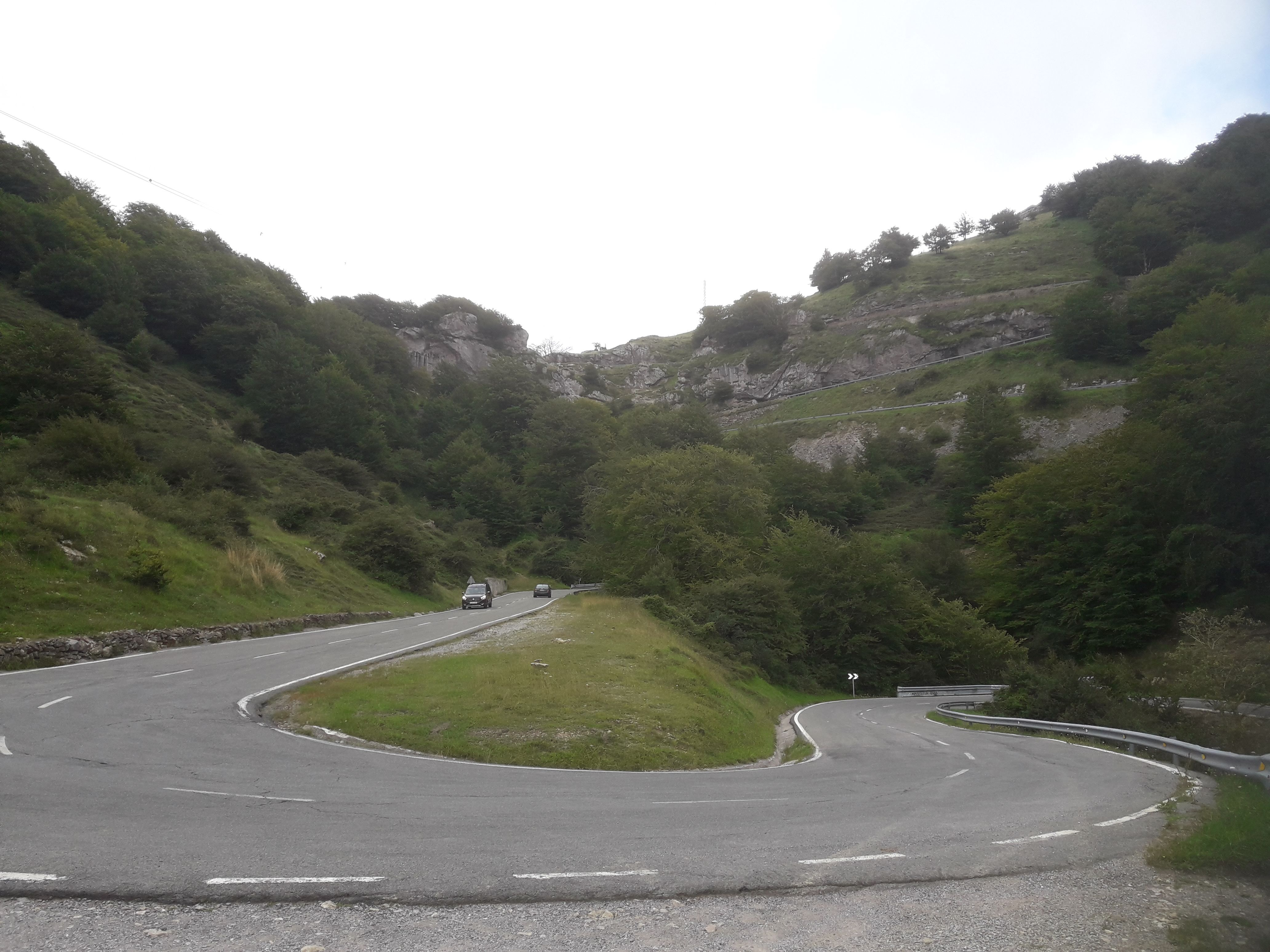 Carretera del coll d'Urbasa, NA-718.